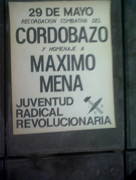 Afiche de la Juventud Radical Revolucionaria (circa 1973)